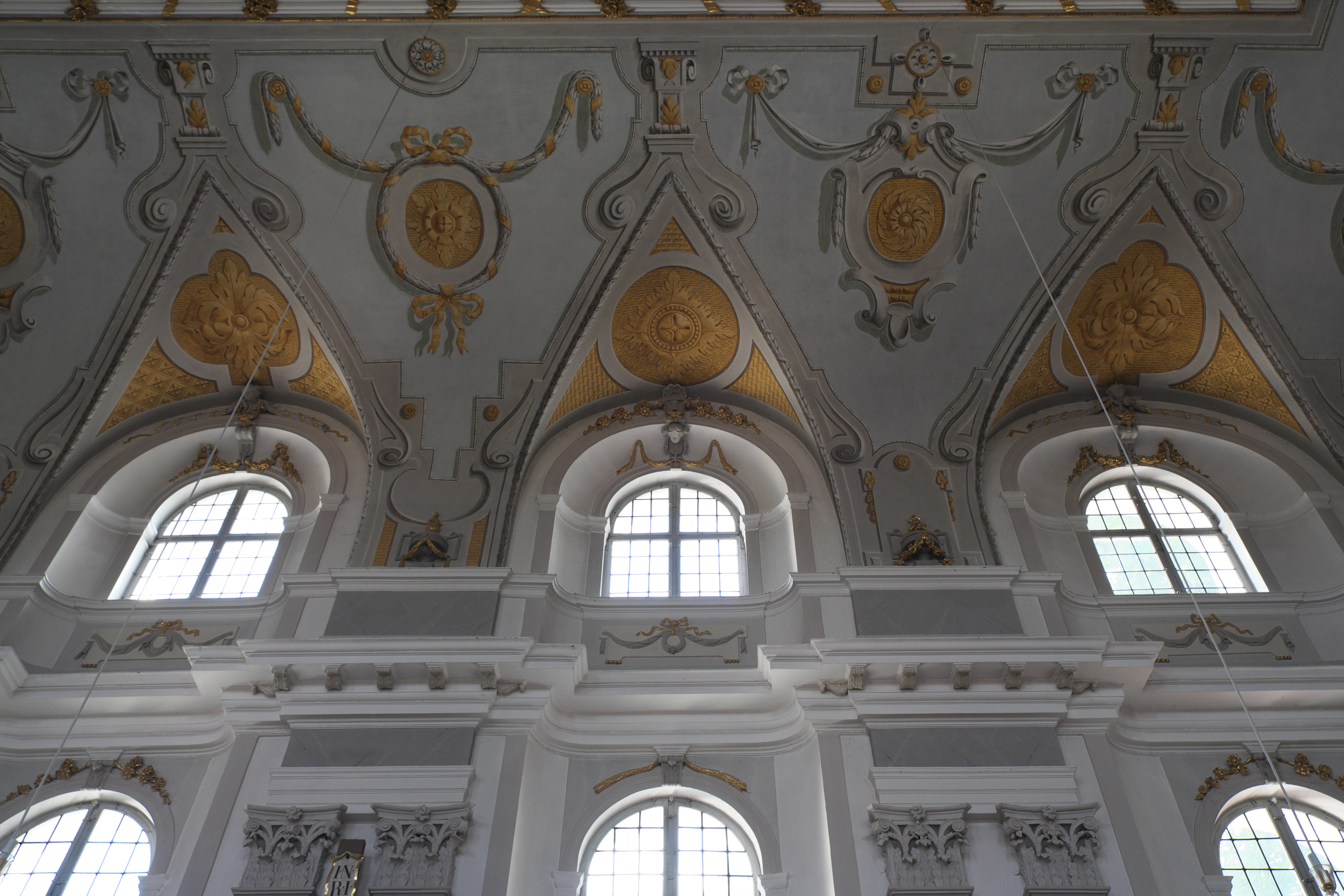 Katholische Pfarrkirche Mariä Heimsuchung in Lechbruck am See im Landkreis Ostallgäu (Bayern/Deutschland), Stuckdekor im Langhaus